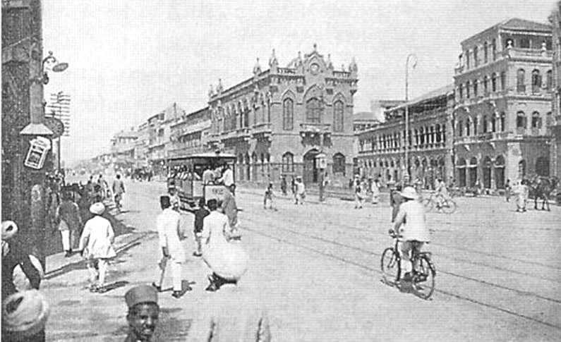 Bunder Road